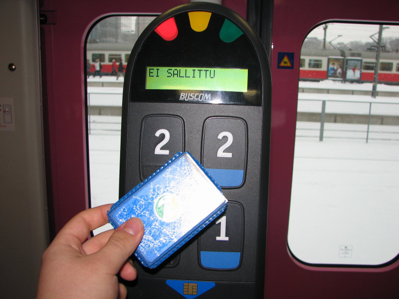 Pääkaupunkiseudun matkakortti ja lukijalaite.